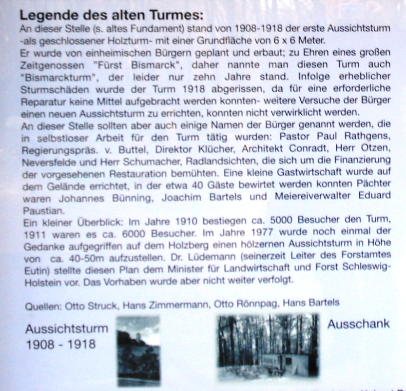 Information zum Bismarckturm Malente